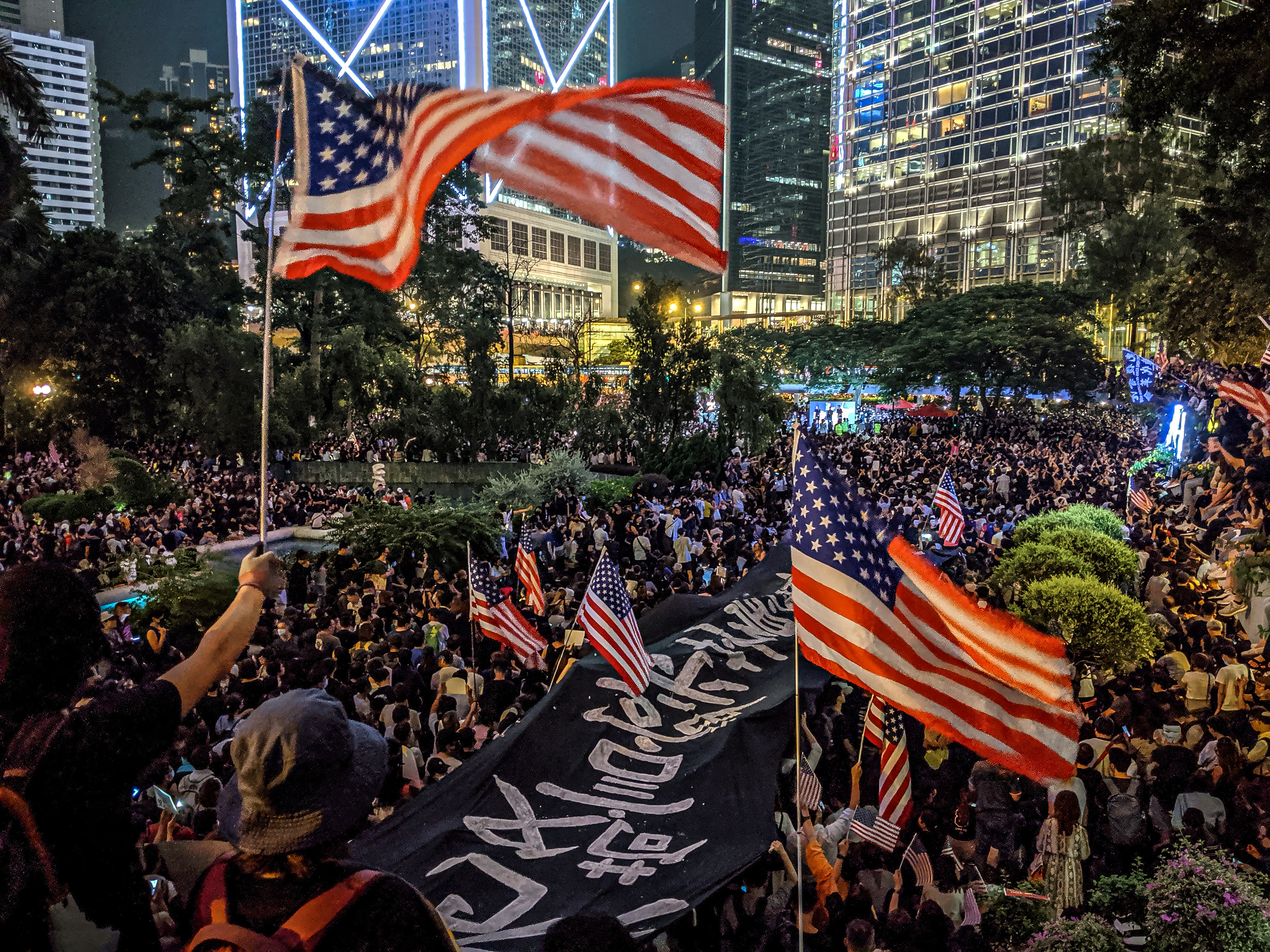 IMG_20191014_195430